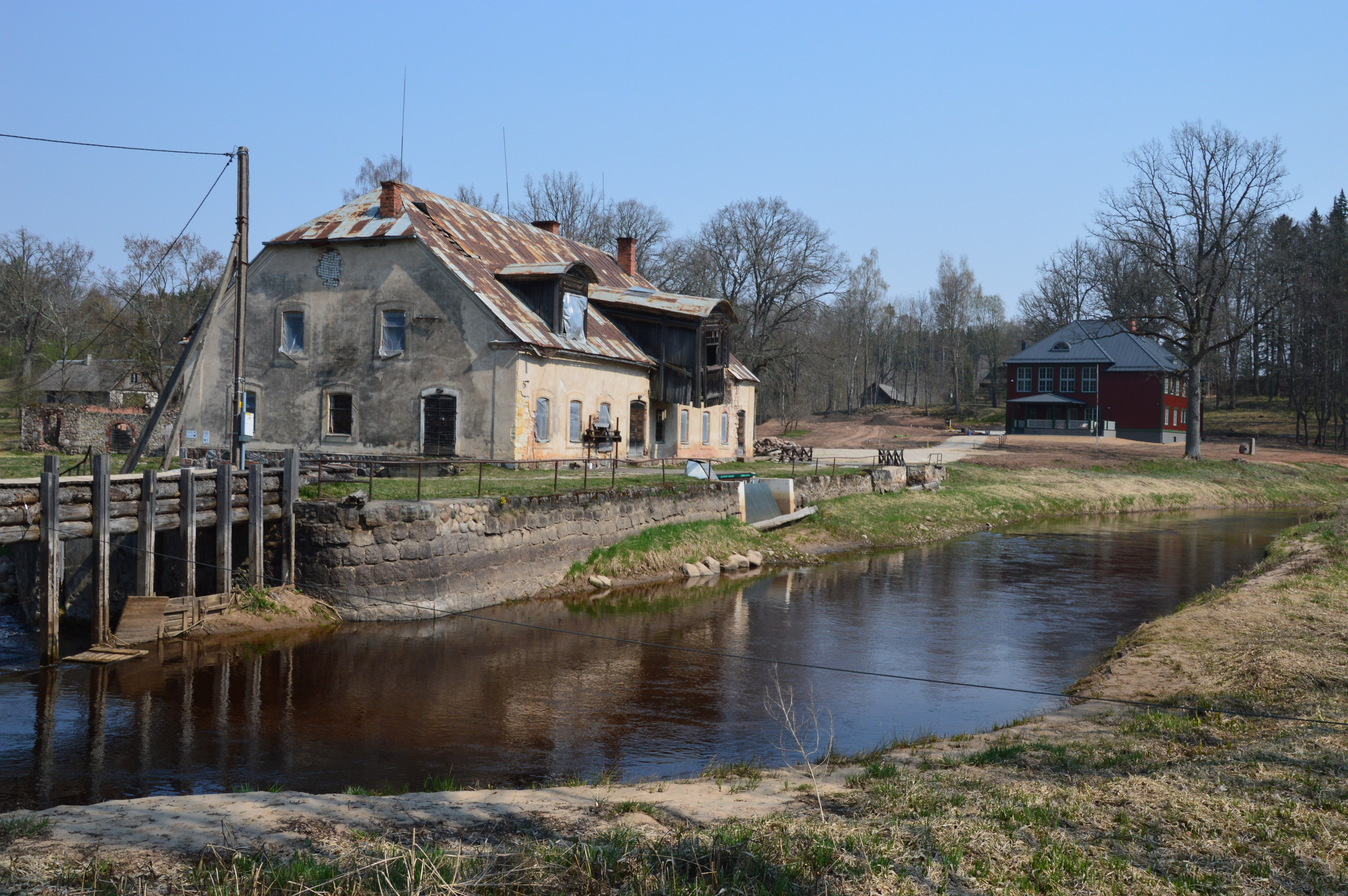 Vastse-Roosa veski ja veskipais. Kaugemal on näha ka endine koolimaja.